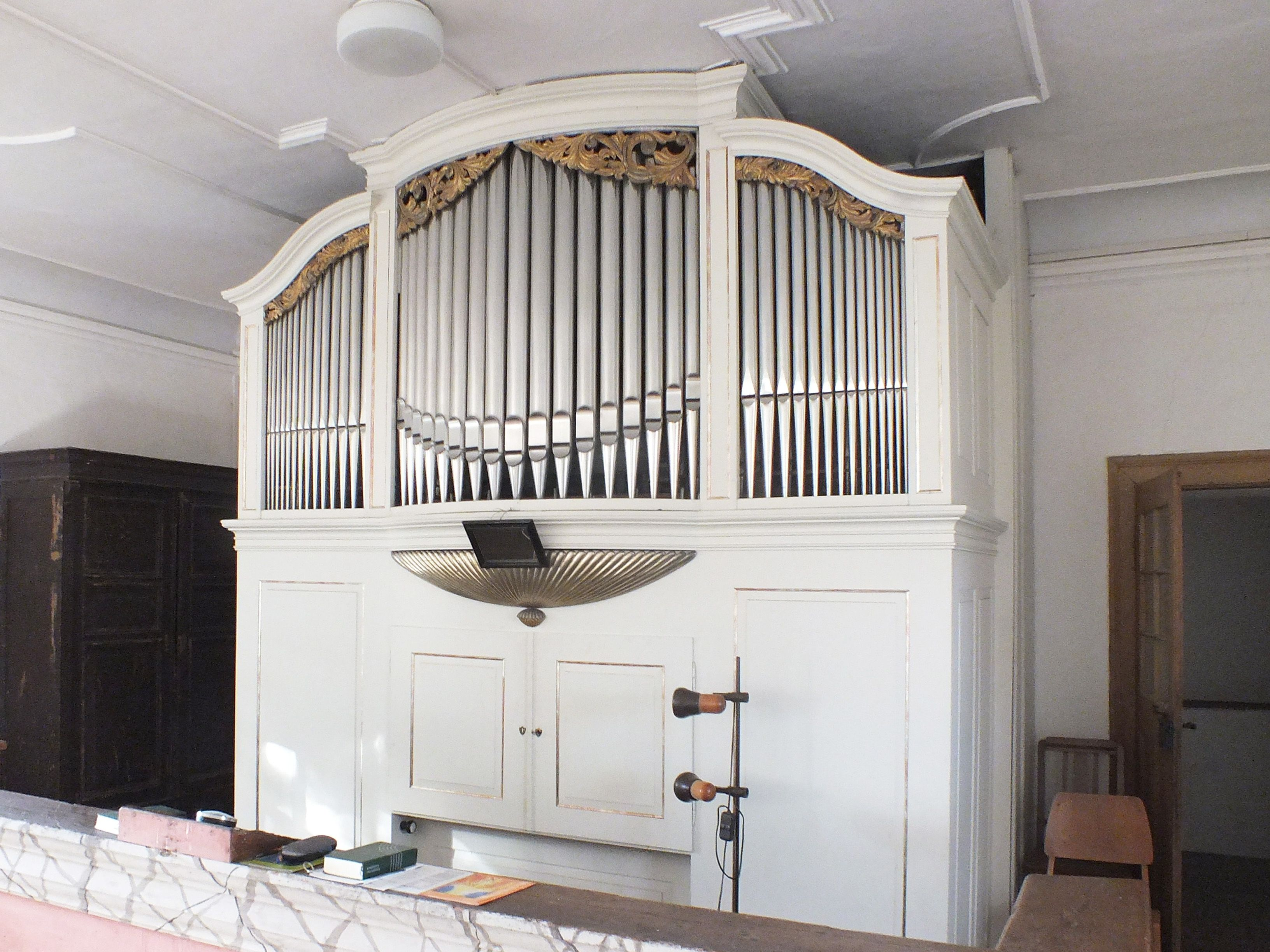 Kreutzbach-Orgel in der Kirche Hohenheida